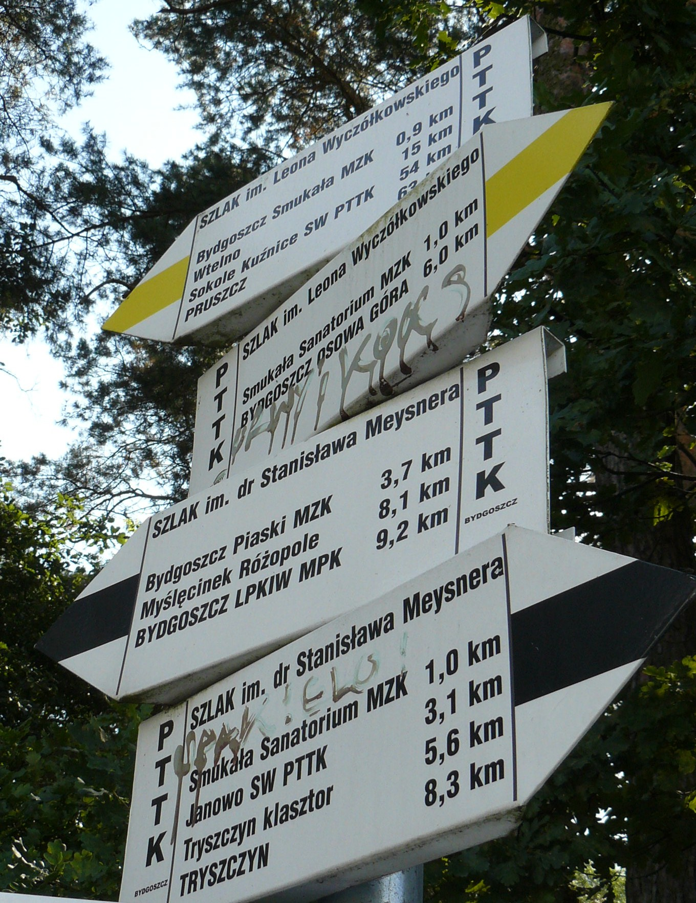 Szlaki turystyczne Opławca i Smukały - Bydgoszcz.